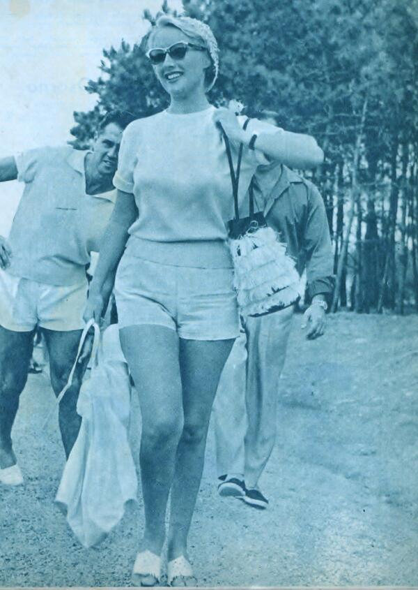 Mirtha Legrand en Punta del Este luego de jugar al golf.